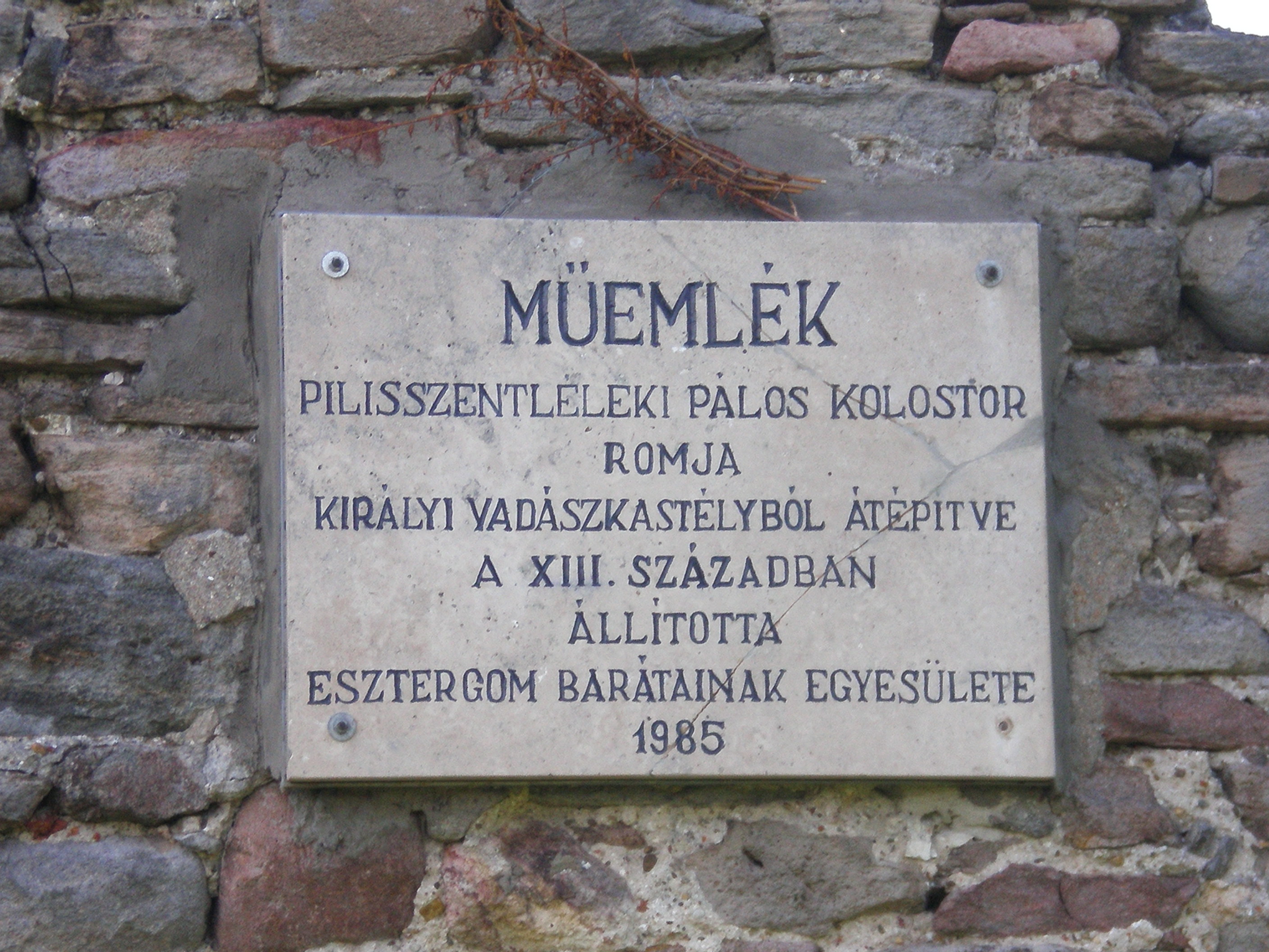 Emléktábla a Pálos kolostor romjain (Pilisszentlélek, Hungary)